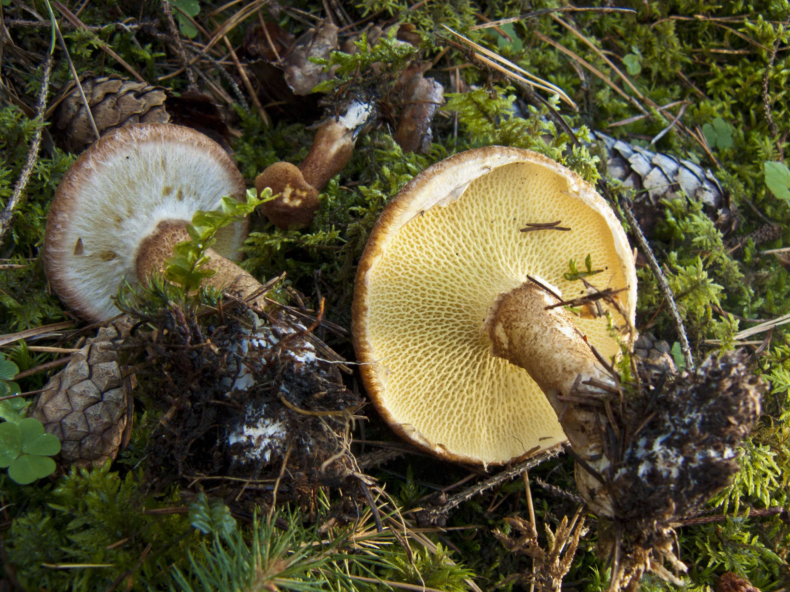 Hřib dutonohý (Suillus cavipes) - Sedlčansko